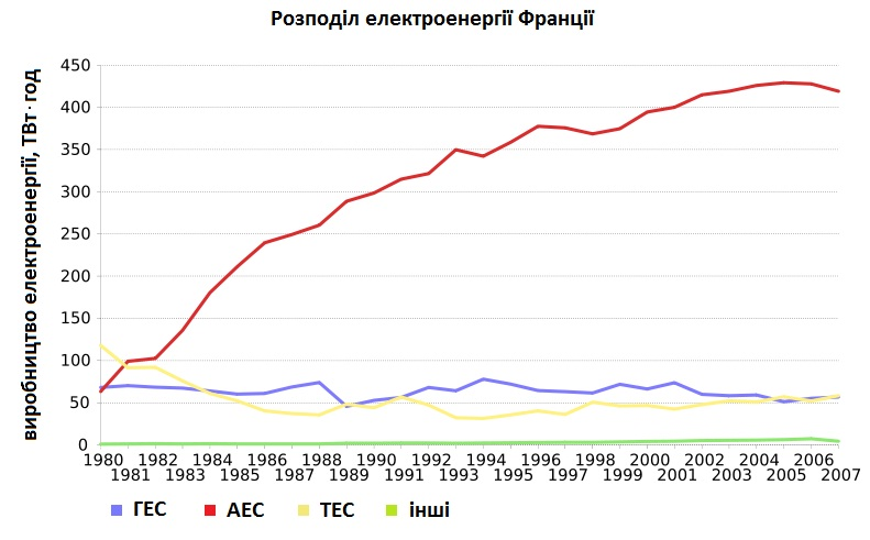 Розподіл електроенергії між АЕС та іншими електростанціями